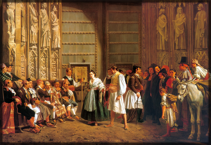 Miniatura Tribunal de les Aigües de Valencia - Miniatura Tribunal de las Aguas de Valencia